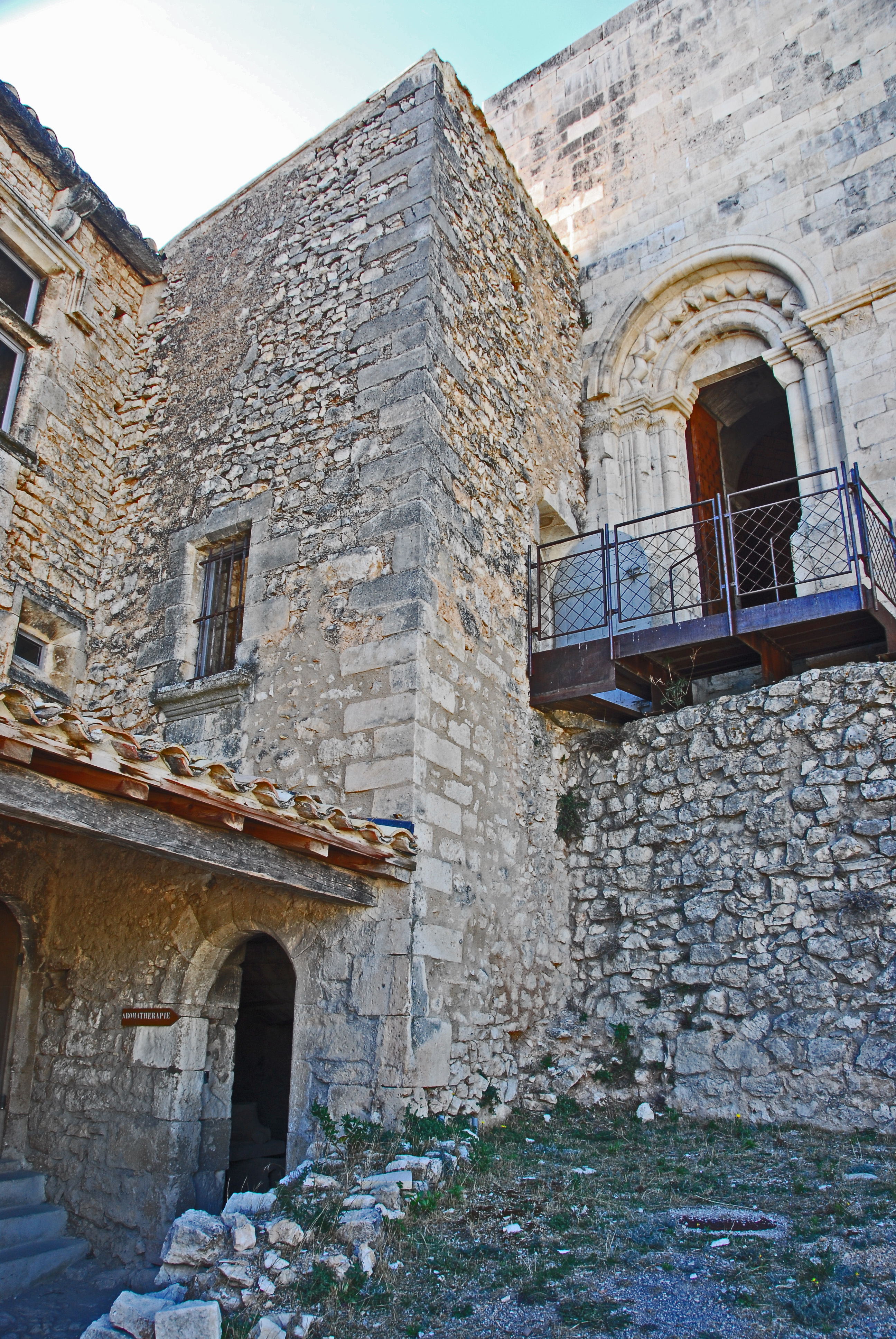 Chateau de Simiane-la-Rotonde, Tredppenhaus u. Hauptportal von NO